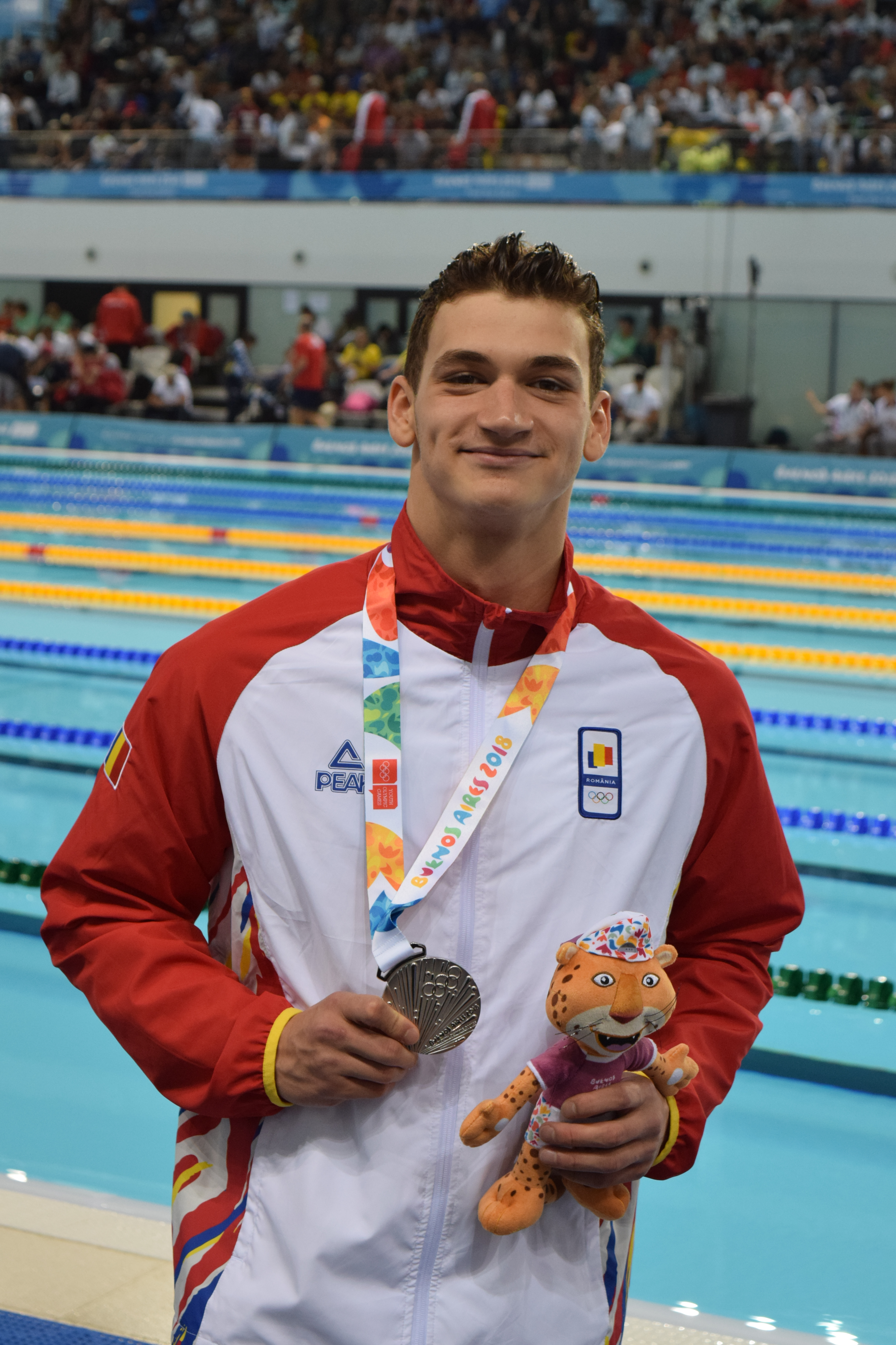 Finales de natación , durante los Juegos Olímpicos de la Juventud 2018 en Buenos Aires. Tarde del 10 de octubre. Daniel Cristian MARTIN.